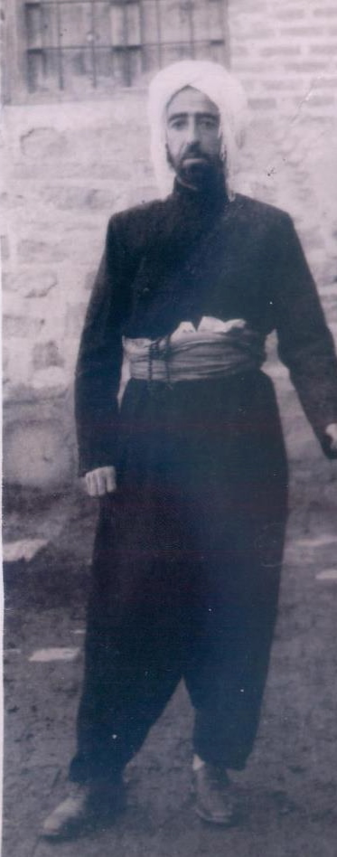 سیدکامل امامی بوکانی در زندان ارومیه؛ سال 1325